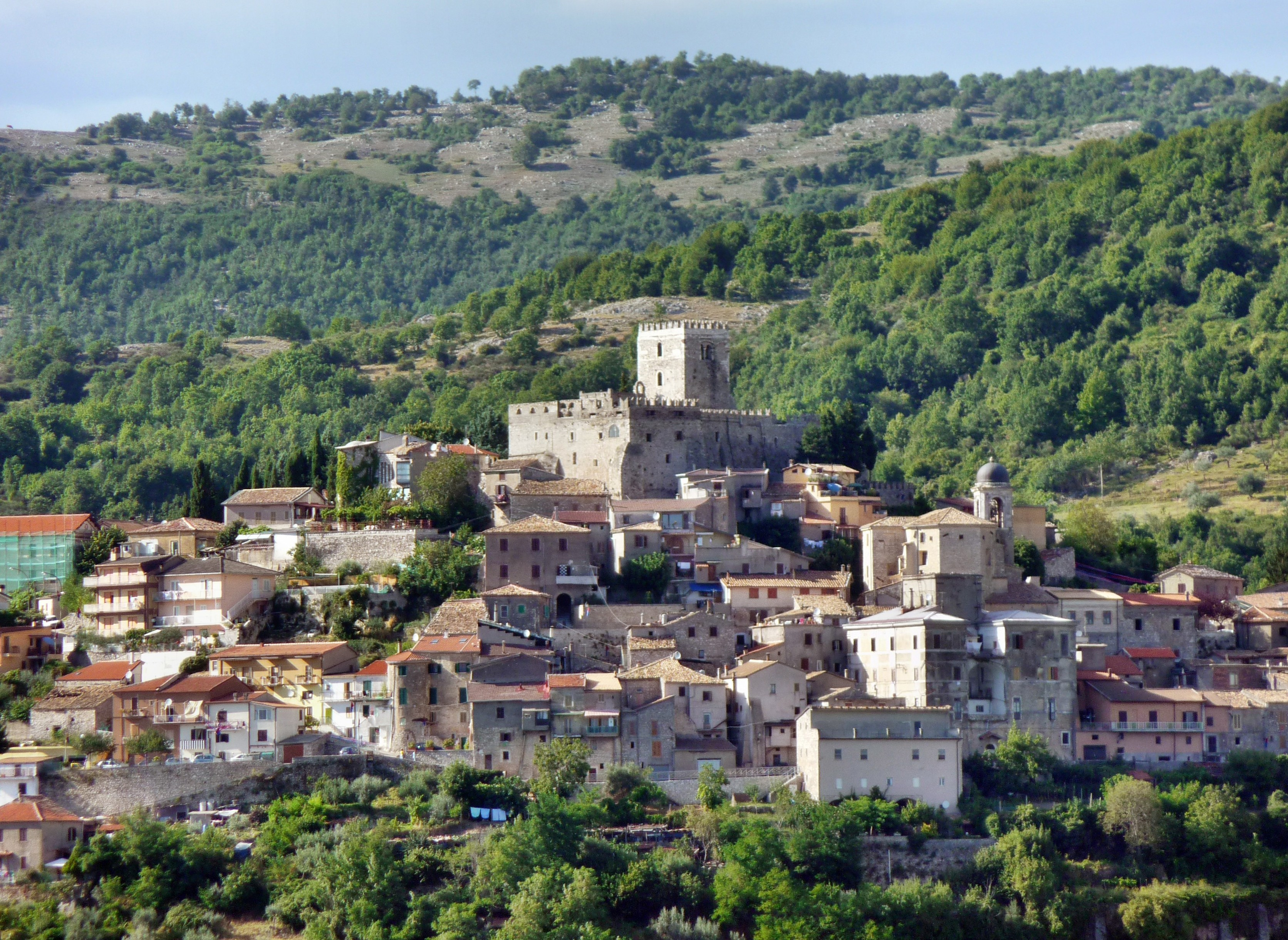 Torre Cajetani vista da Trivigliano